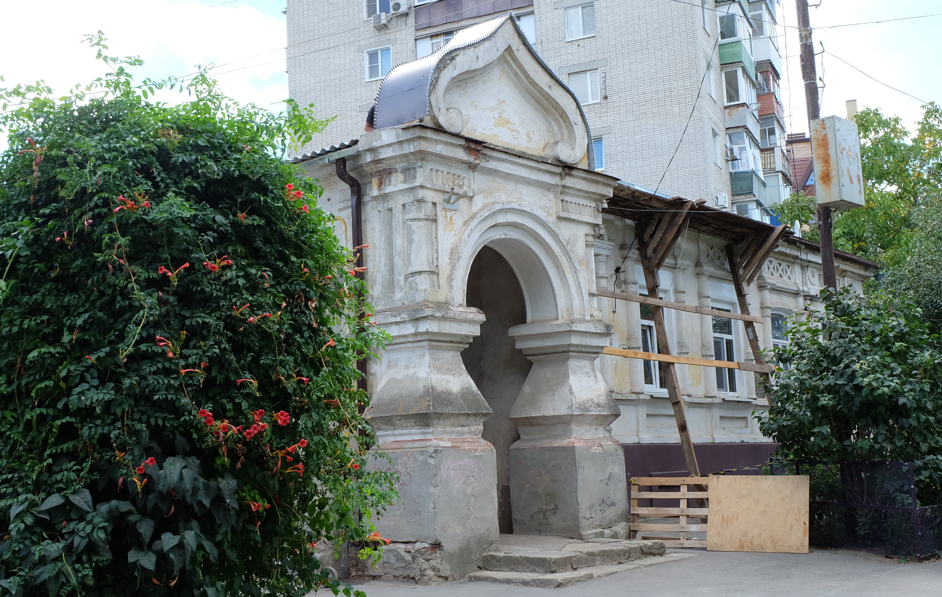 Дом Покровского: бульвар Комсомольский, 43, Таганрог, Ростовская область